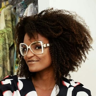 Nay de Deus em 2018.